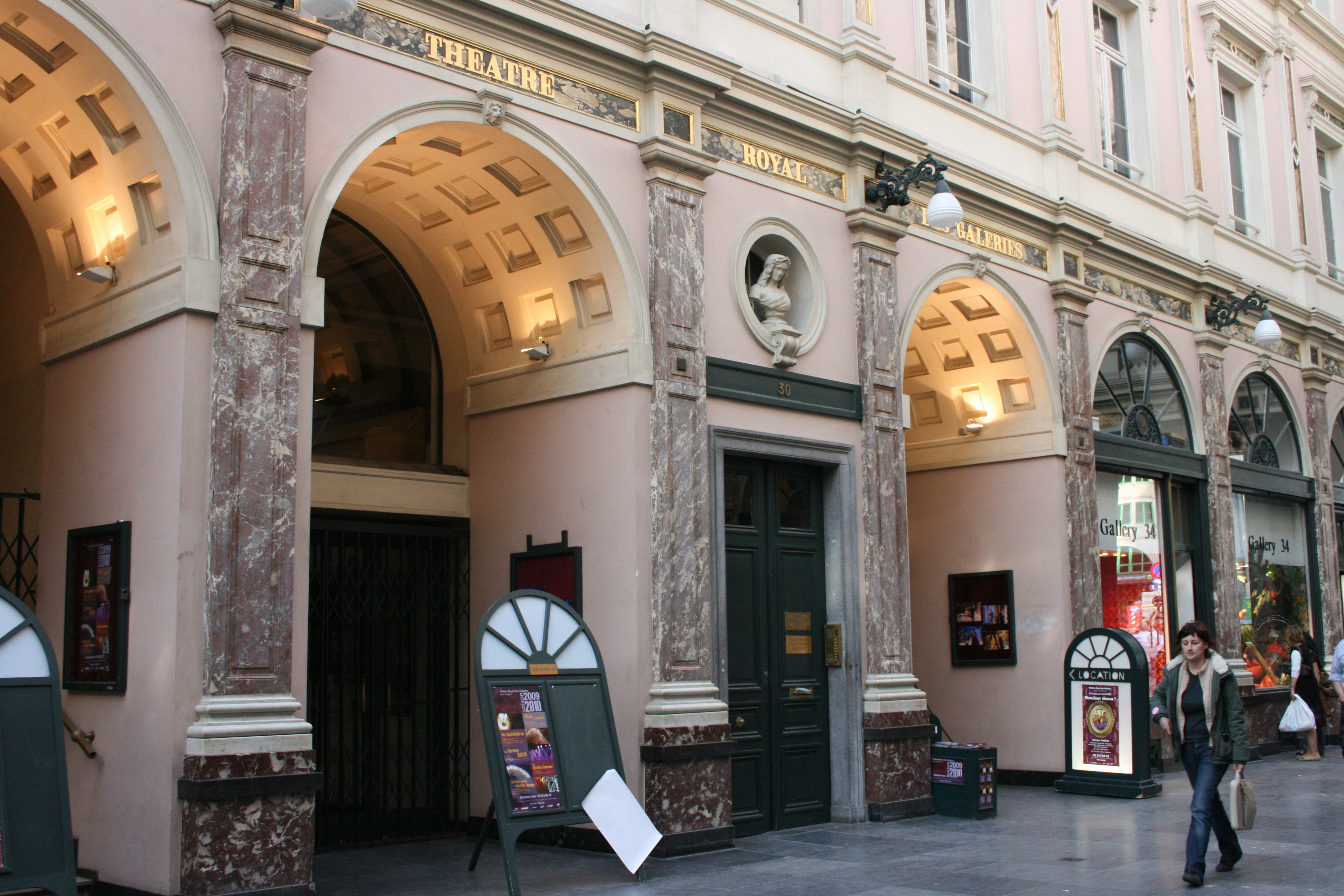 Galerie du Roi 32 (Galeries royales Saint-Hubert) à Bruxelles (belgique). Théâtre Royal des Galeries